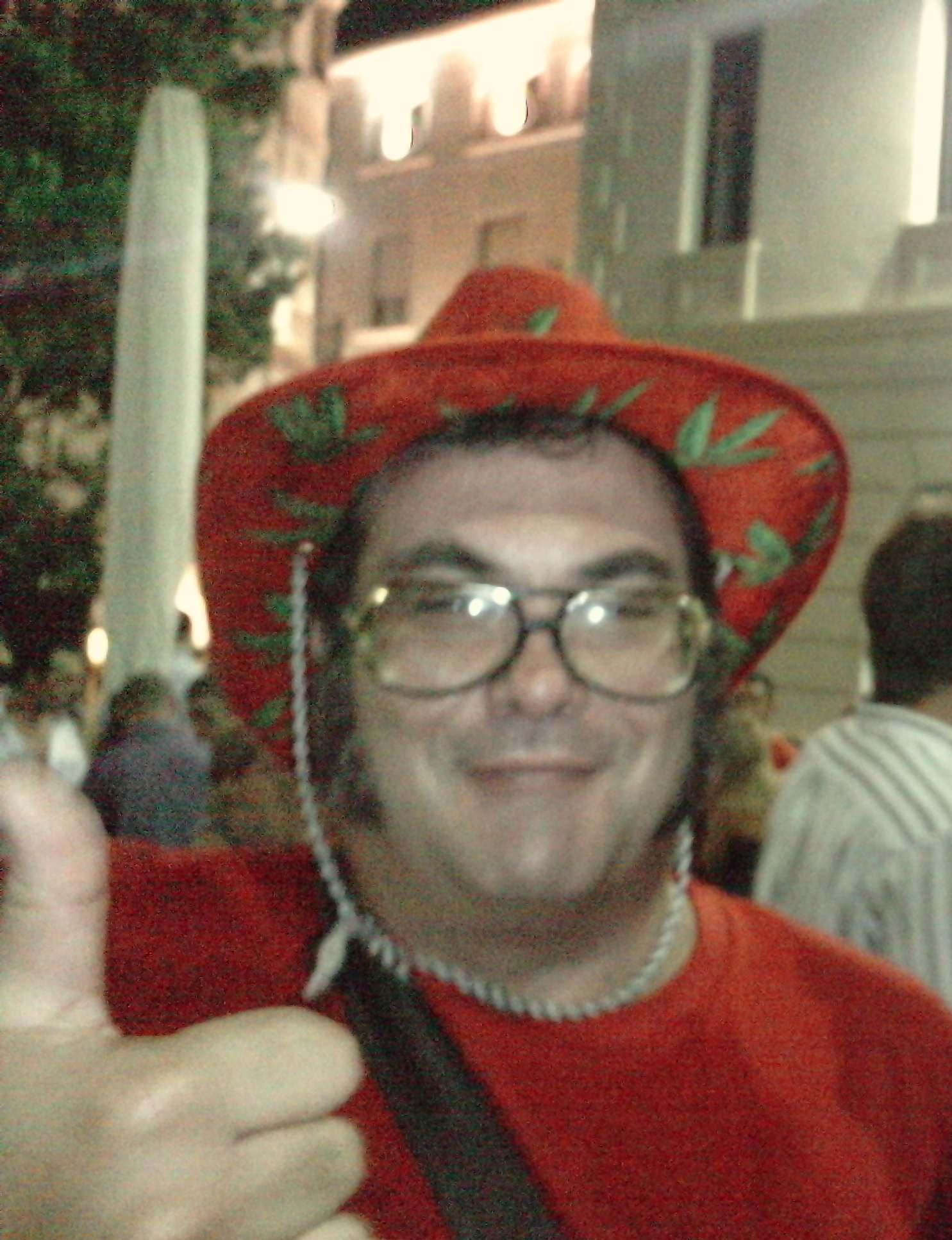 Ariel Santamaria a les festes de Figueres